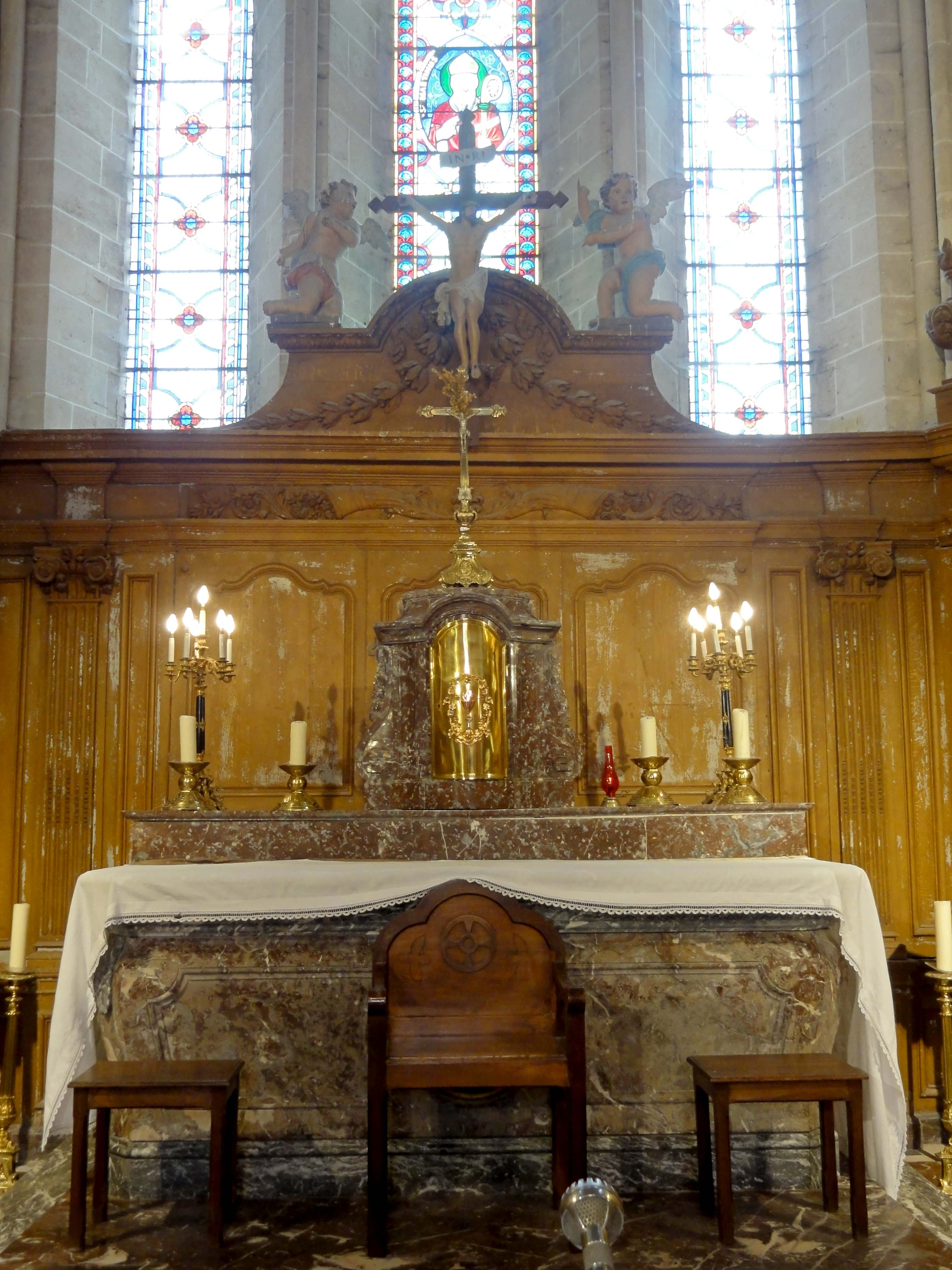 Mobilier de l'église - voir titre.